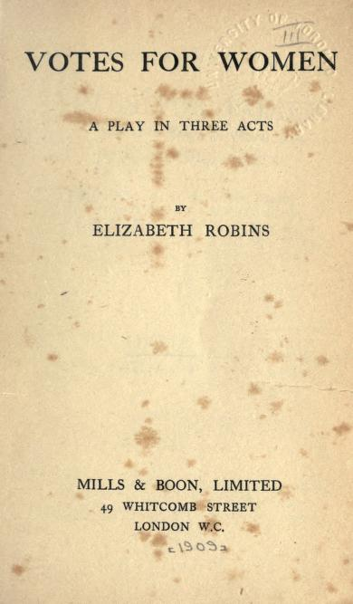 Elizabeth Robins Votes for Women 1907 Title